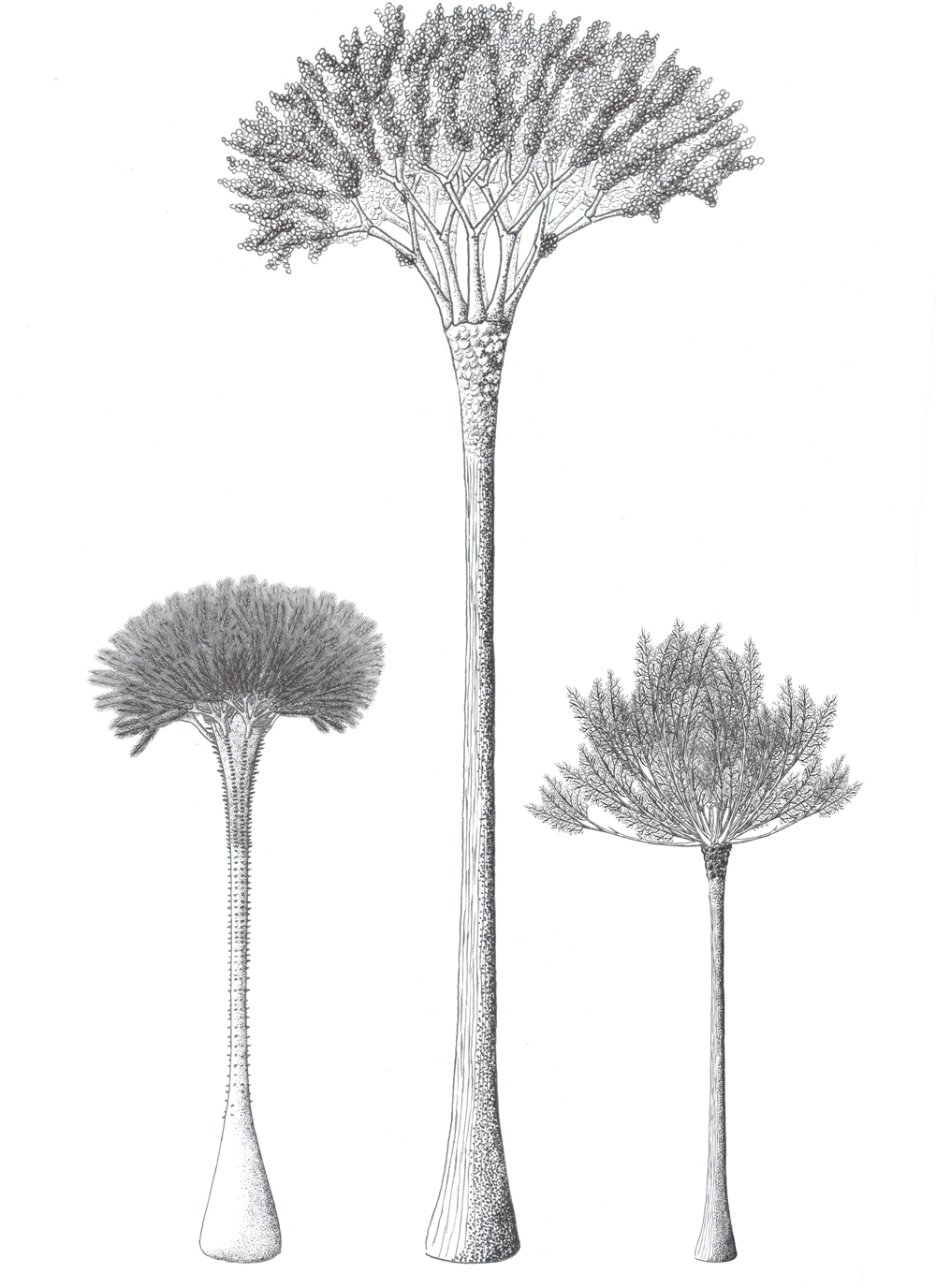 Reconstrucción artística de tres modelos de los géneros Calamophyton, Wattieza y Pseudosporochnus, los representantes mejor conocidos del orden Pseudosporochnales.